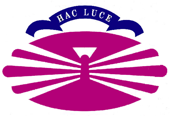 Logotipo universidad coruña